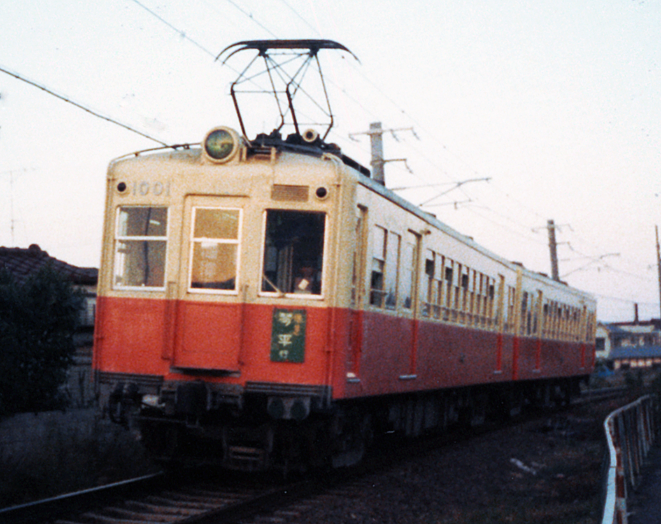 高松琴平電鉄 10000形1001+1002 準急琴平行